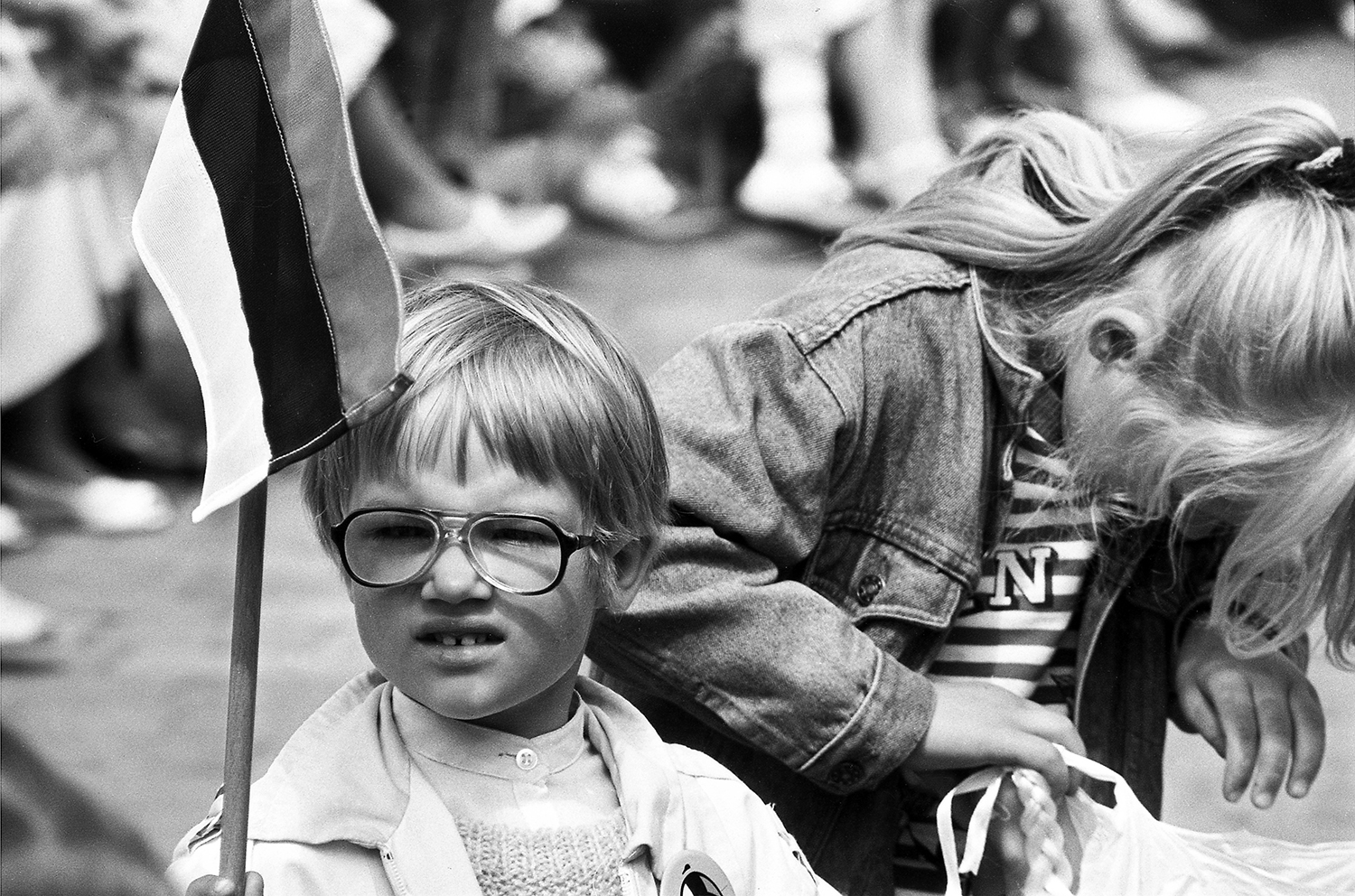 I Ülemaailmsete eesti noorte päevad 89 (6)